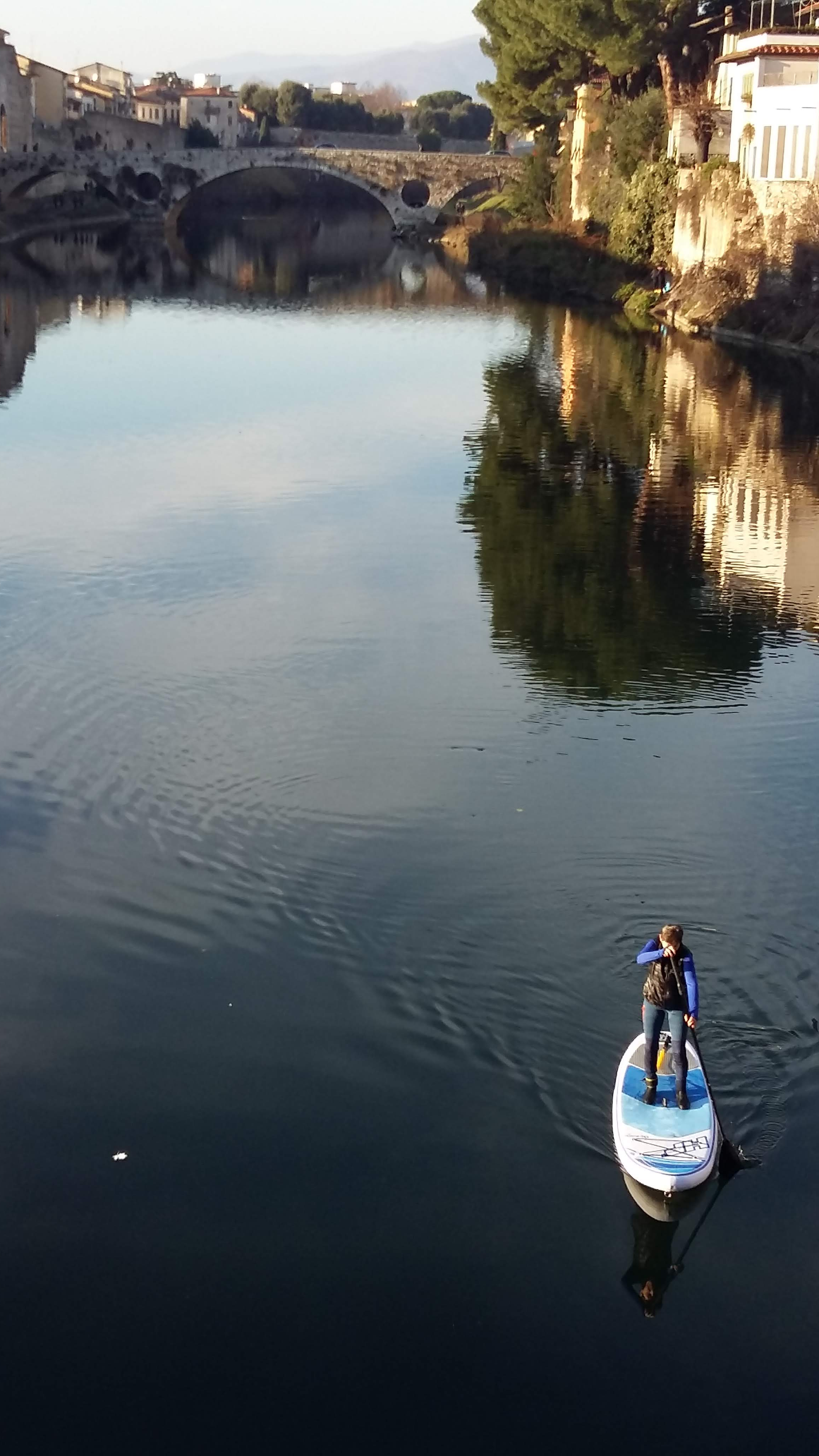 "Stand Up Paddle sul fiume Bisenzio, Prato citta, 1° gennaio 2019"